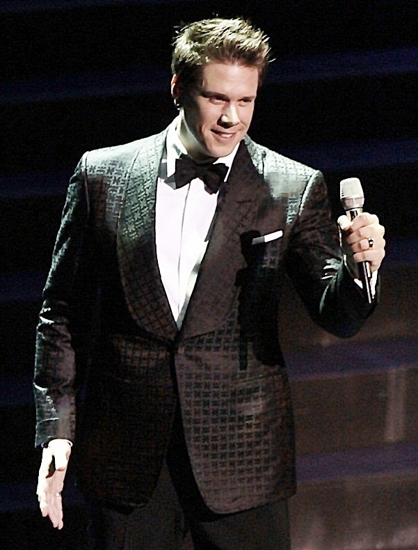 David Miller - Il Divo Orchestra in Concert At Sydney Opera House